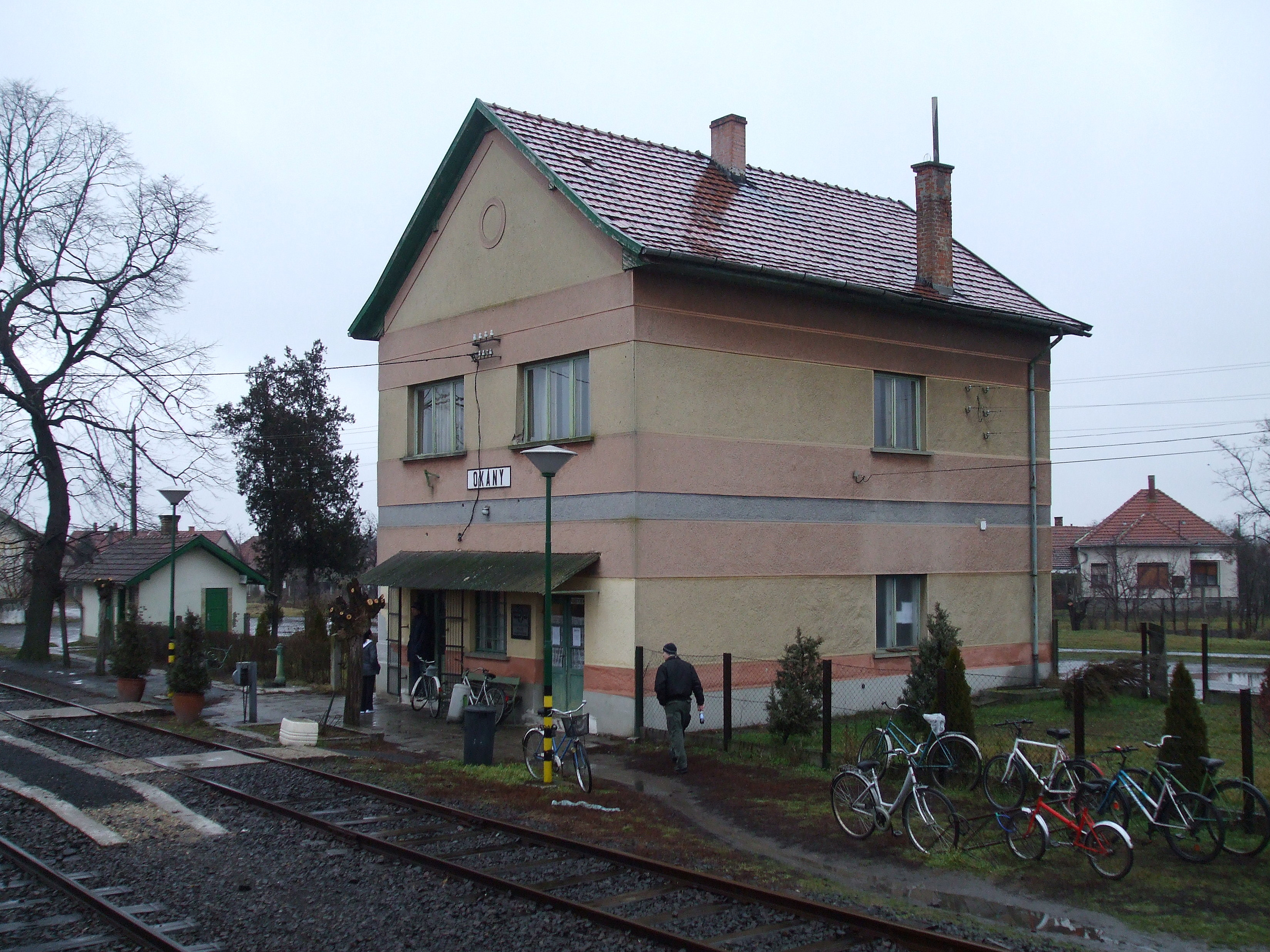 Okány vasútállomása a Békéscsaba–Kötegyán–Vésztő–Püspökladány-vasútvonalon.